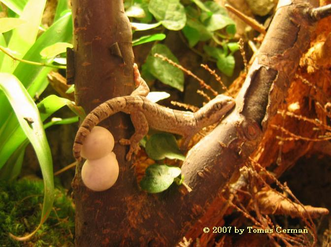 Homopholis fasciata s nakladenými vajíčky